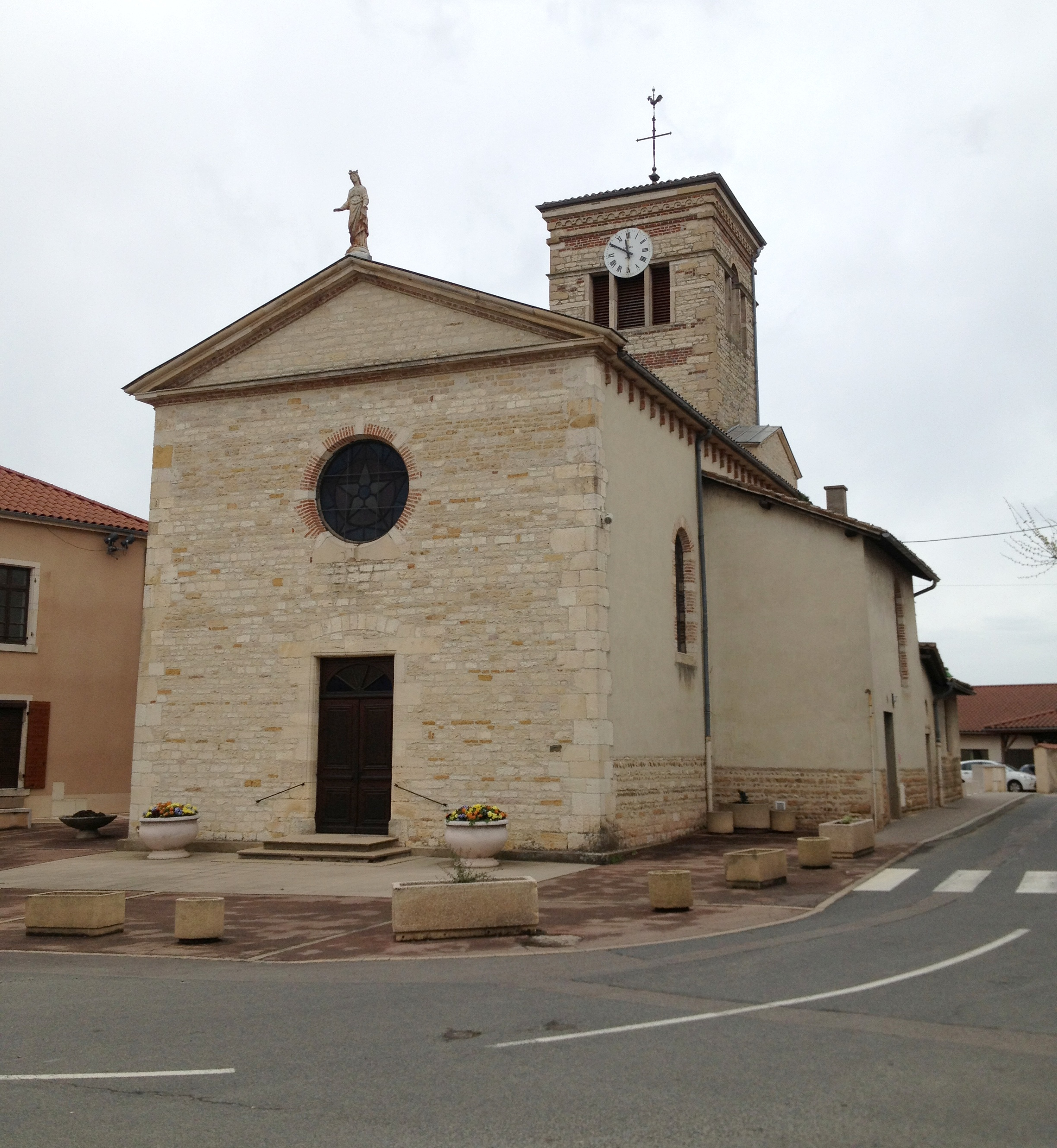 Église Sainte-Madeleine de Villeneuve (Ain).